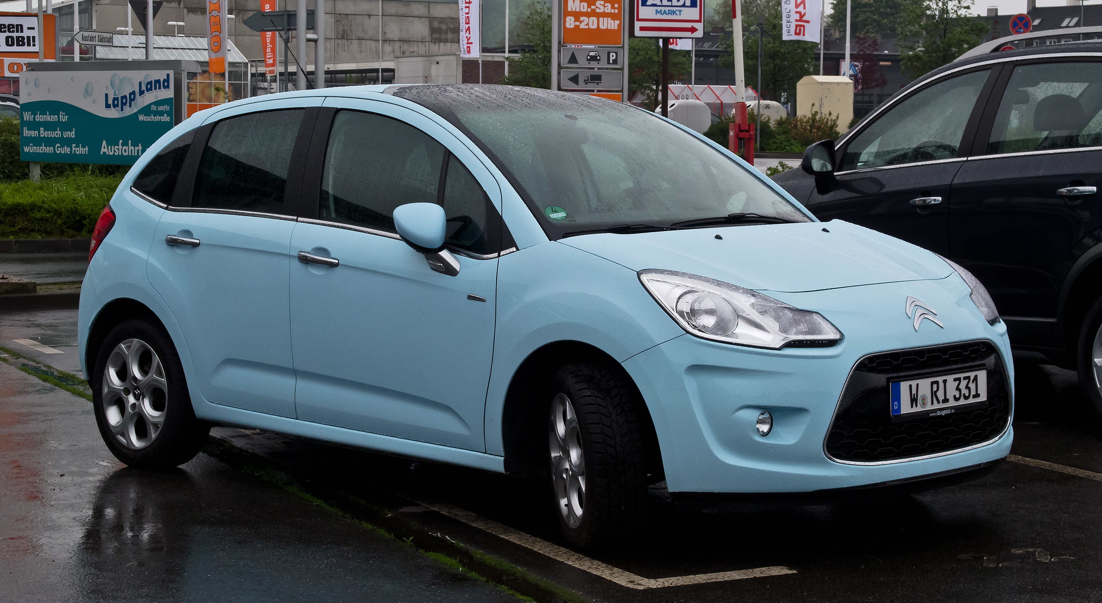 Citroën C3 VTi 120 Exclusive (II)